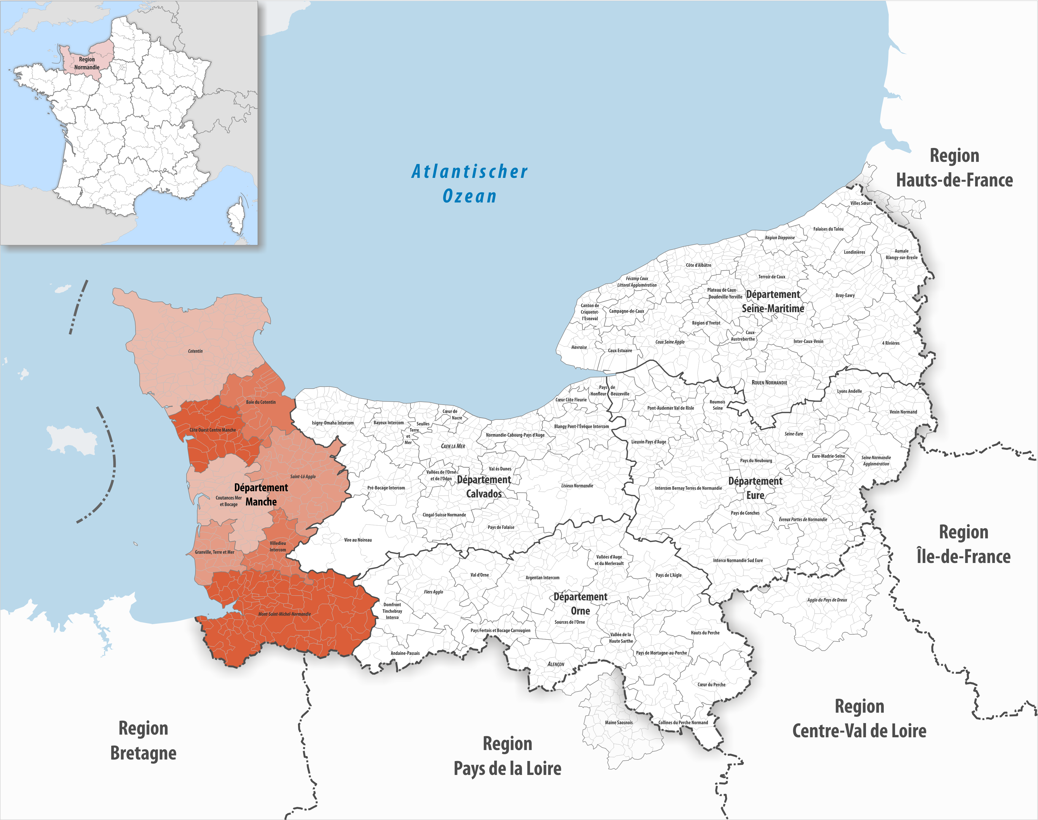 Gemeindeverbände im Département Manche